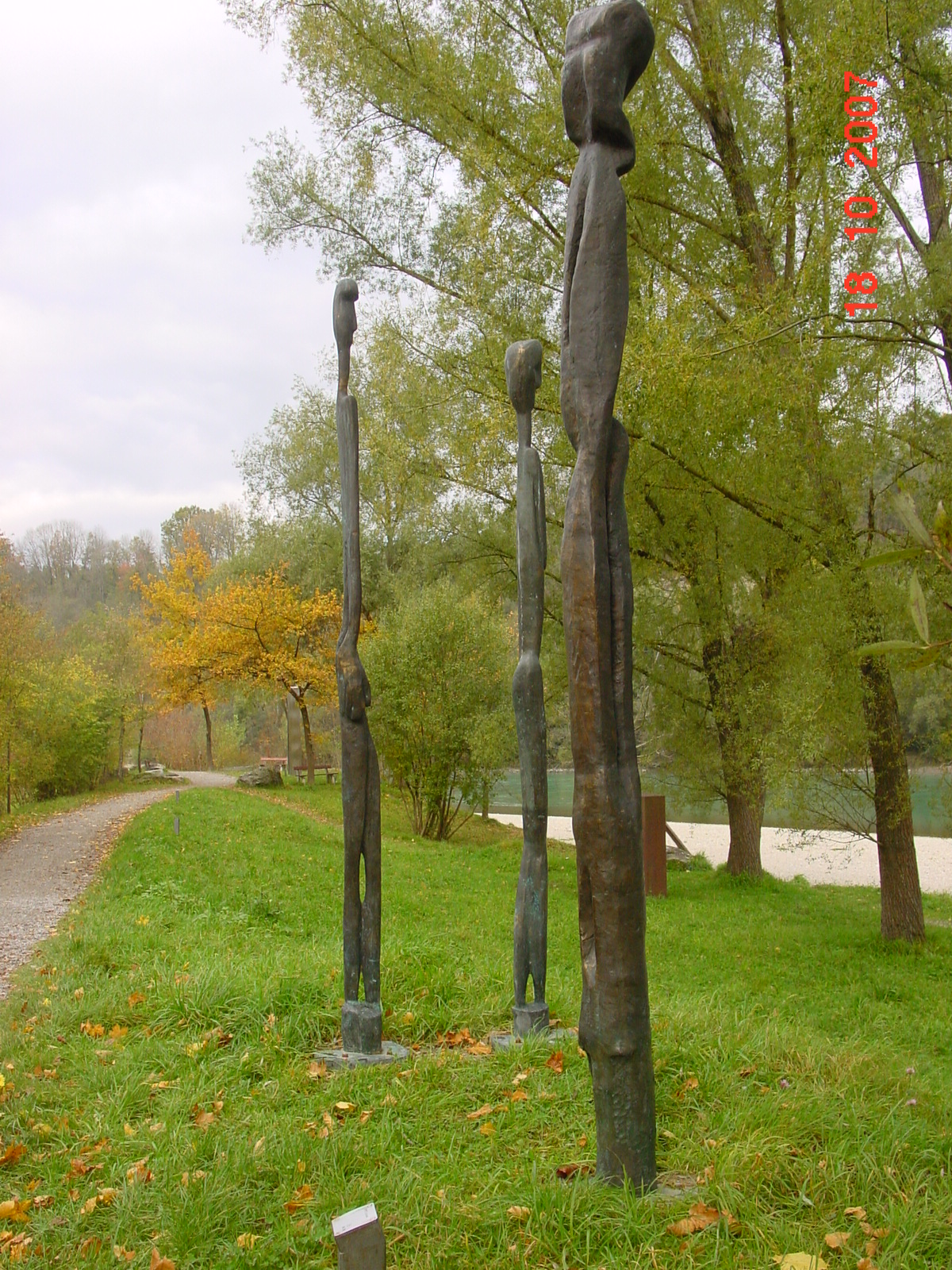 Skulptur im öffentlichen Raum